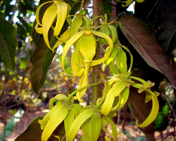 Name : Cananga odorata Family : Anonaceae വീട്ടിൽ വളർത്തുന്ന ഈ ചെറുവൃക്ഷത്തിൽ സുഗന്ധമുള്ള പുക്കളുണ്ടാവുന്ന